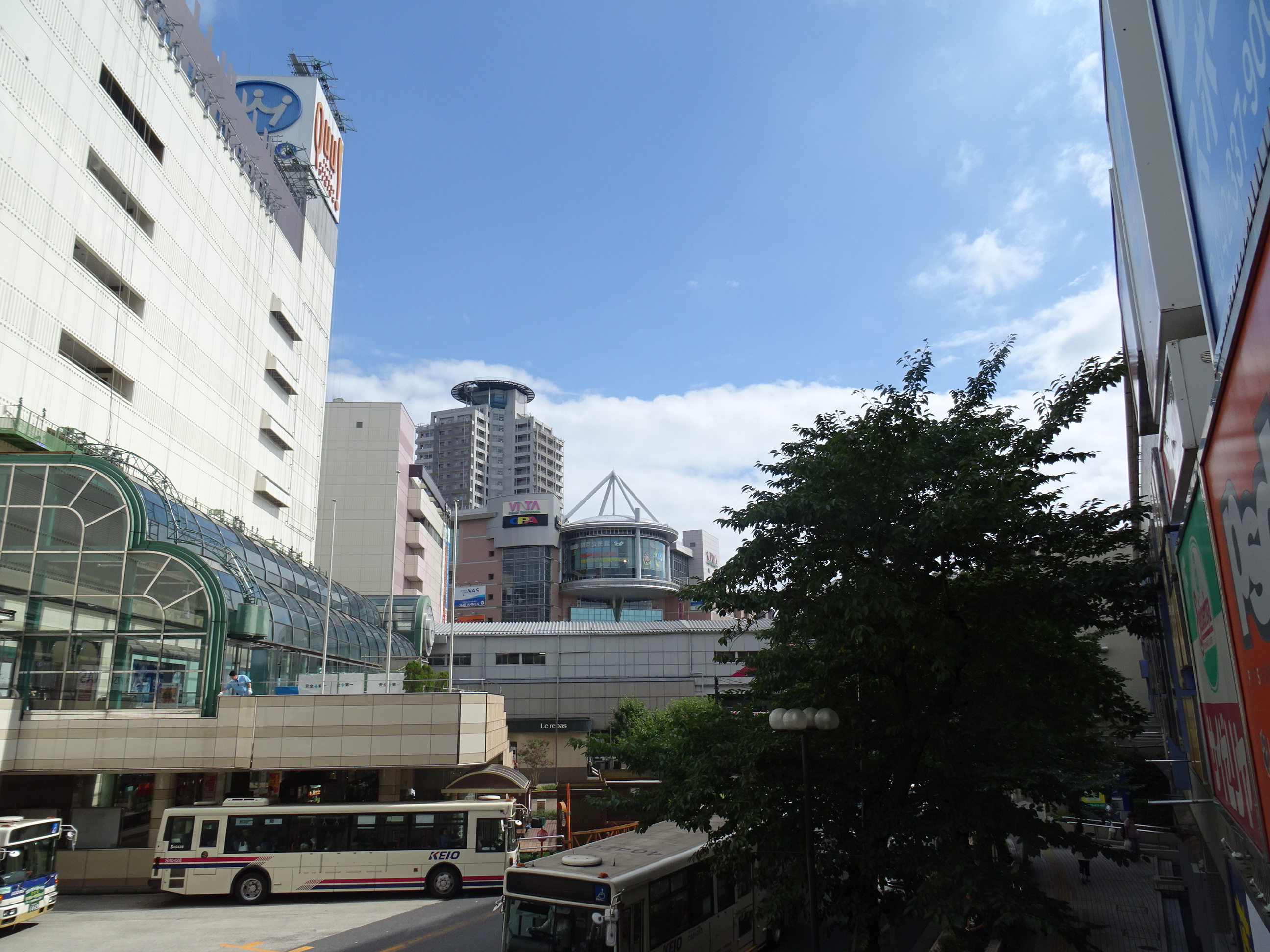 多摩市の聖蹟桜ヶ丘駅前（2017年08月12日撮影）